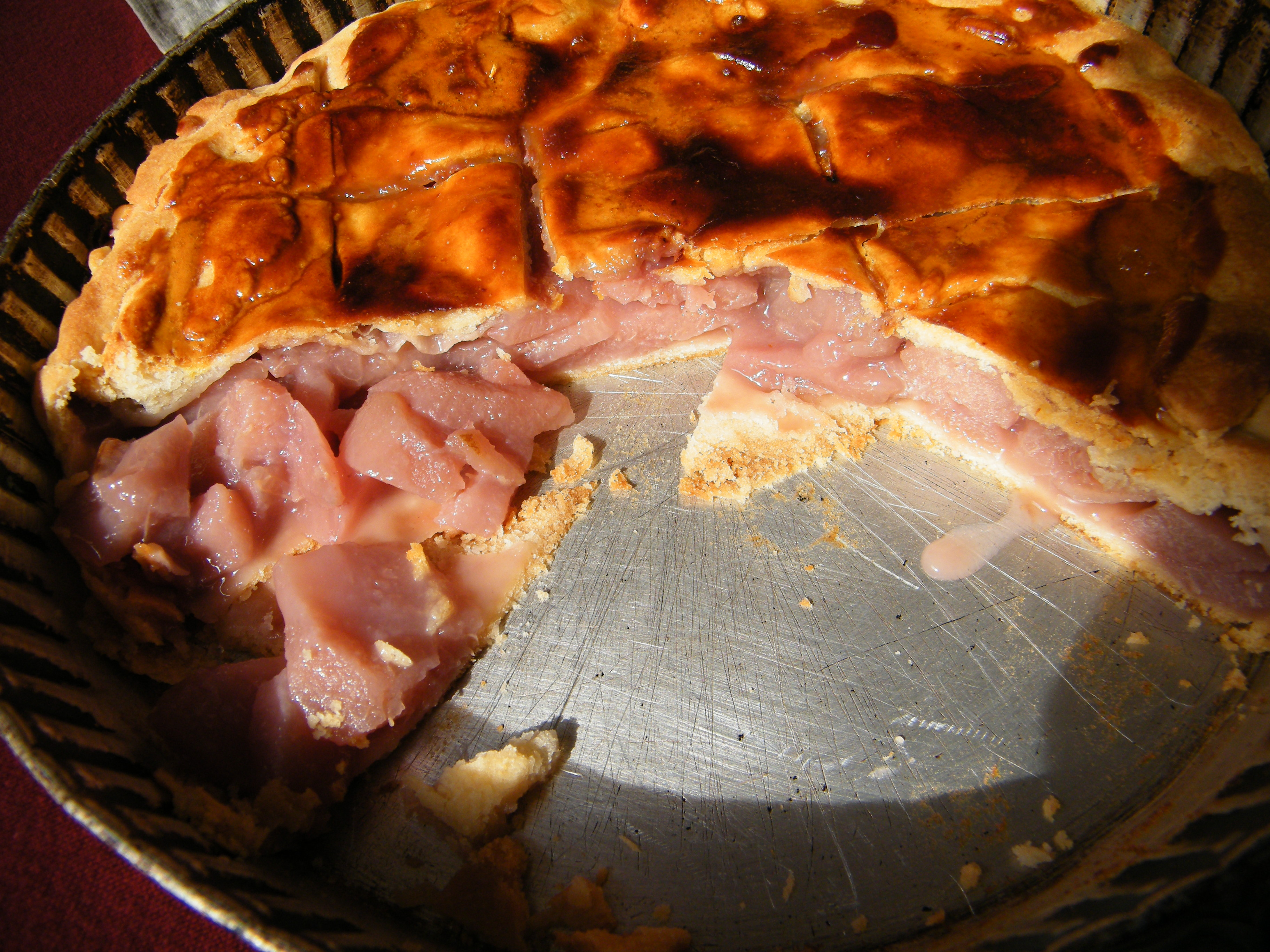 Pâté de poires de Fisée, spécialité picarde et normande.